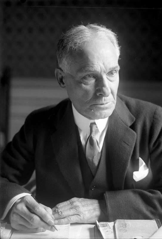 Der frühere amerikanische Botschafter in Berlin Dr. Shurman sammelte in Amerika 2 Millionen Mark für den Professoren- und Studenten-Austausch zwischen Deutschland und Amerika. Die Stiftung soll die wissenschaftlichen Forschungen beider Länder unterstützen und näherbringen. Porträtaufnahme des früheren amerikanischen Botschafters in Berlin Dr. Shurman.